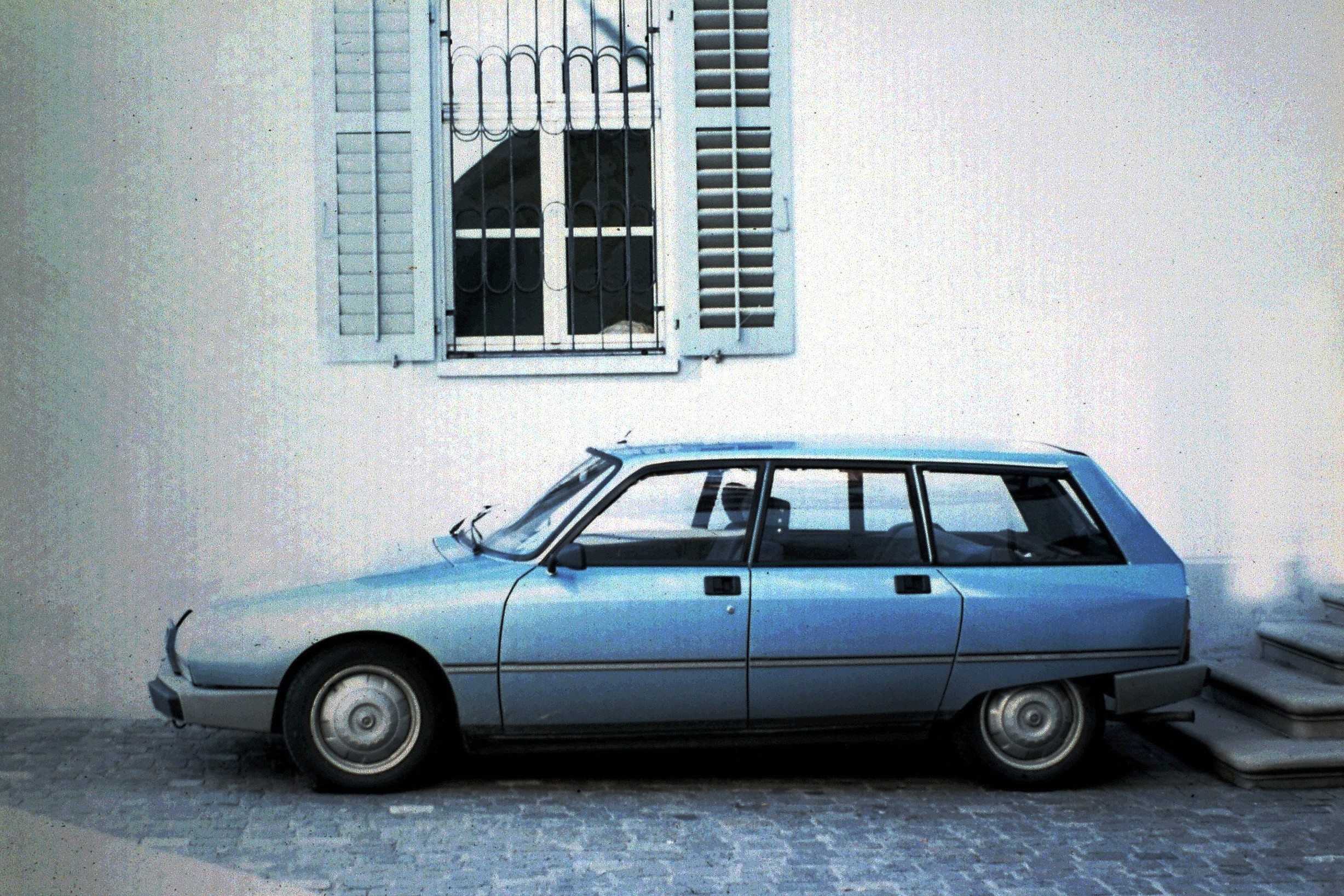 Citroen GSA Break